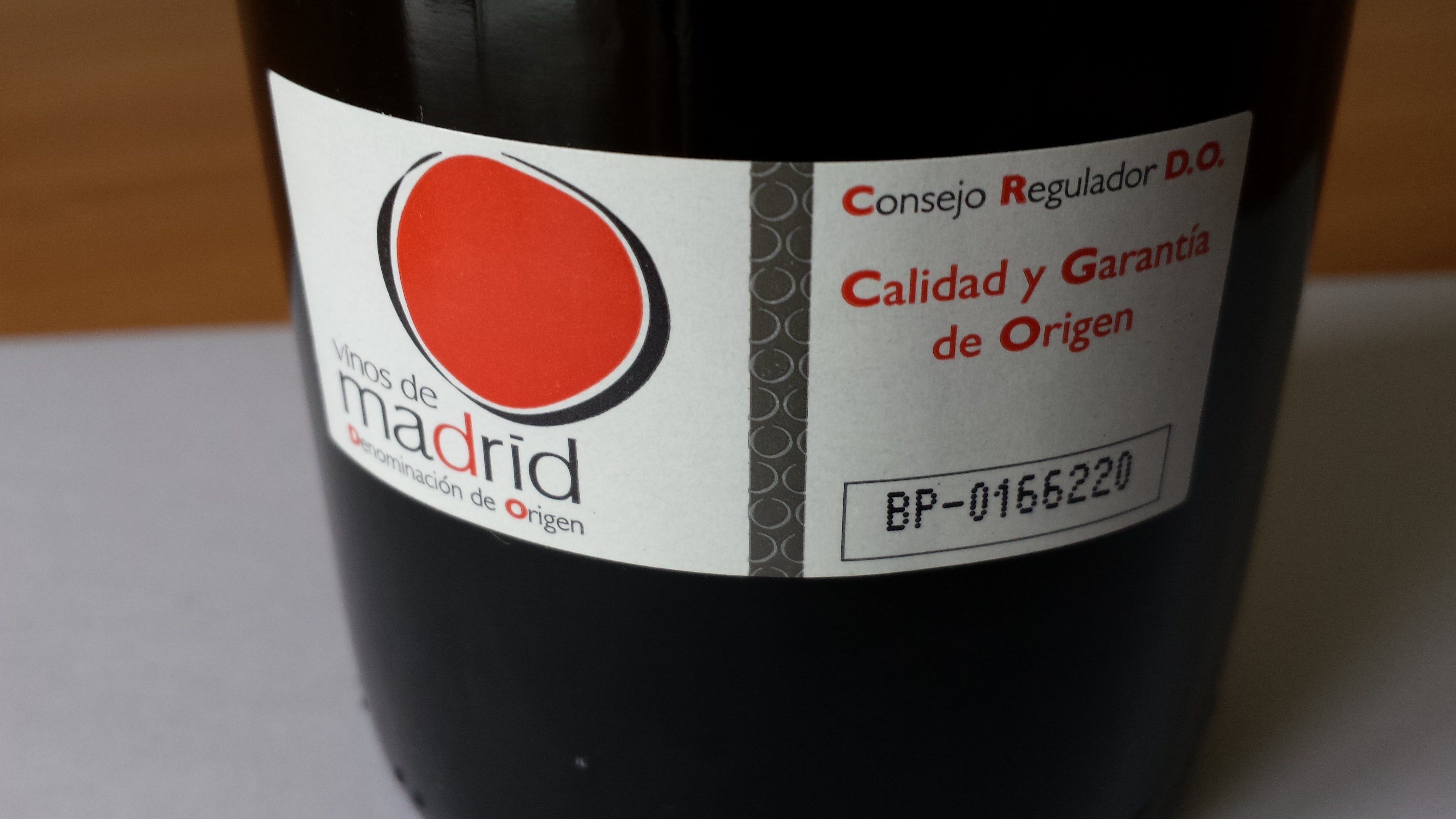 Etiqueta vinos de Madrid DO, España.